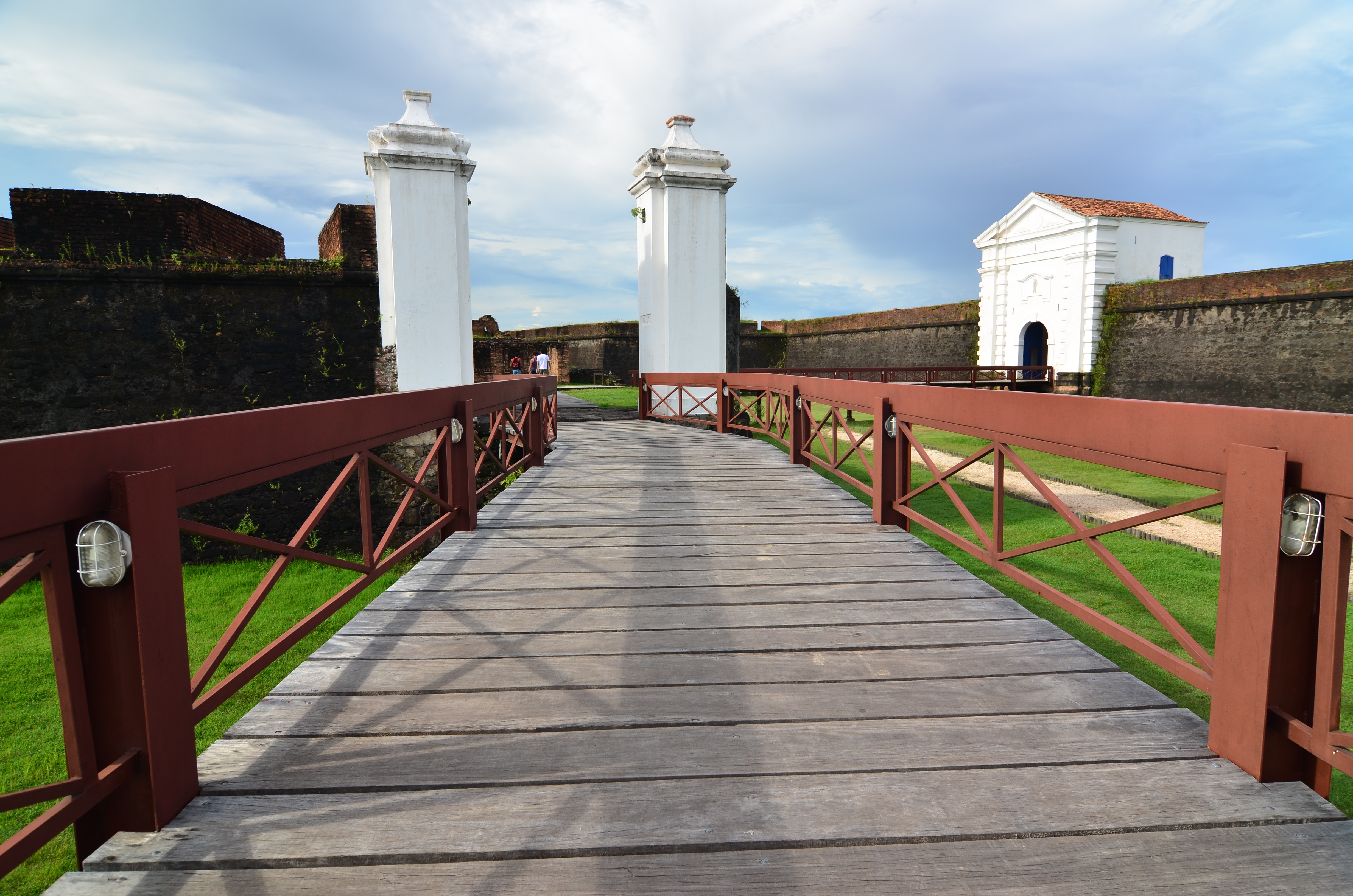 Fortaleza de São José de Macapá